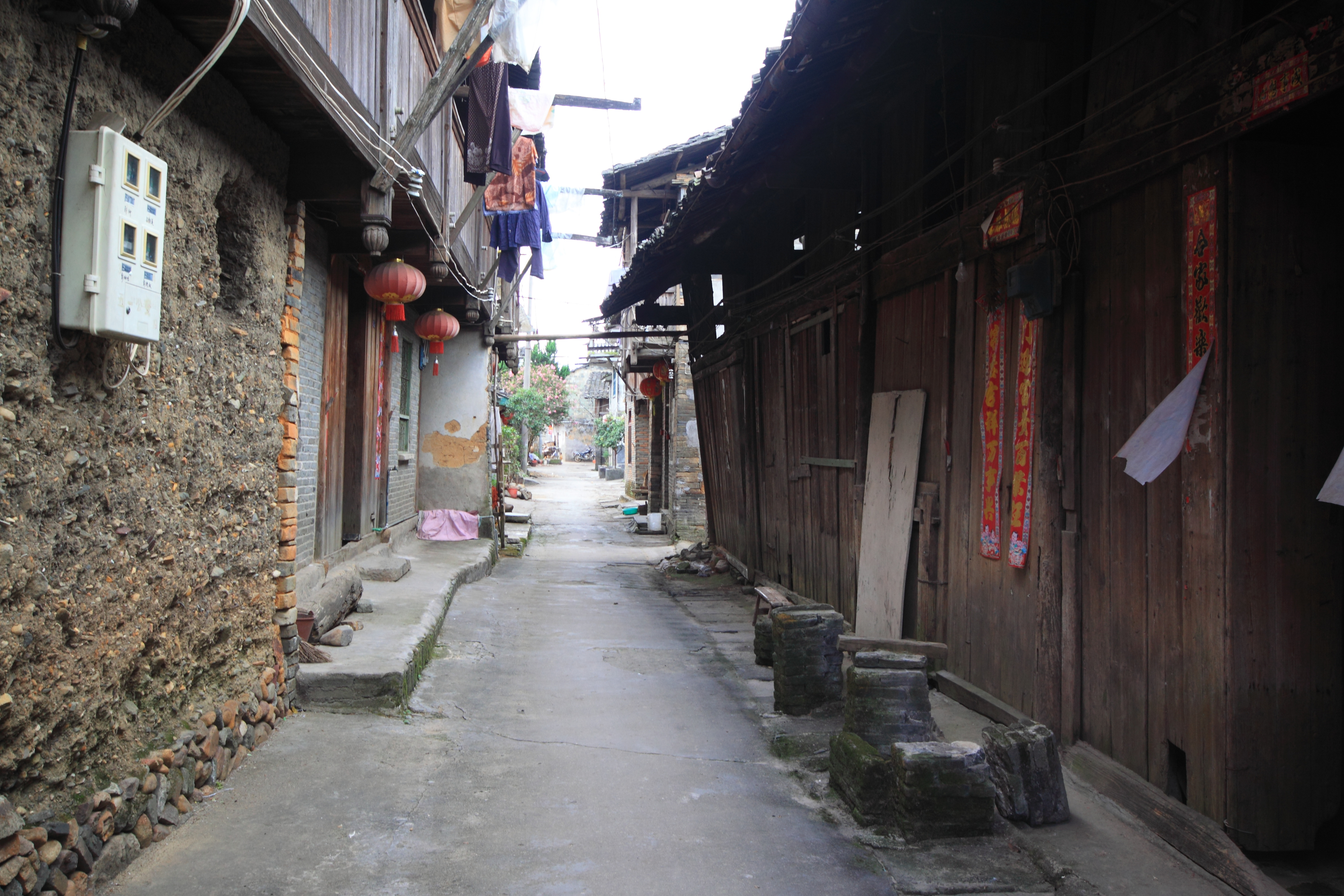 五夫古街